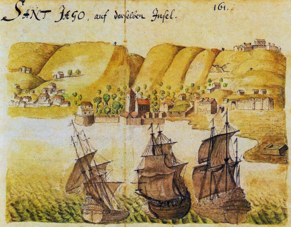 Santiago, na mesma ilha. Antiga Ribeira Grande, Cidade Velha, ilha de Santiago, Cabo Verde. Aguarela sobre papel Forschungsbibliothek Gotha, CHART B.533 FOL.160R-161V., Alemanha